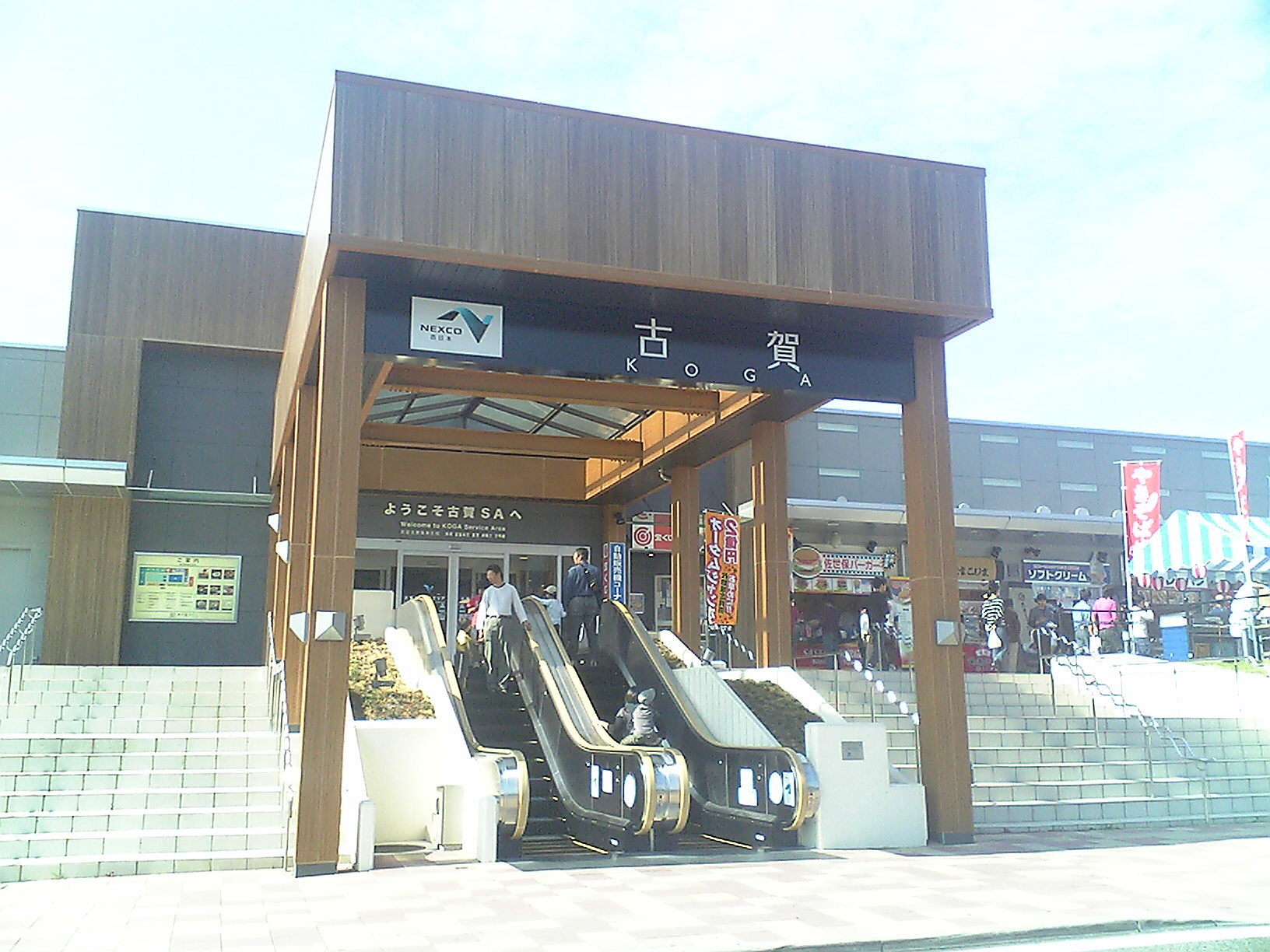 福岡県古賀市の古賀サービスエリア（上り線）